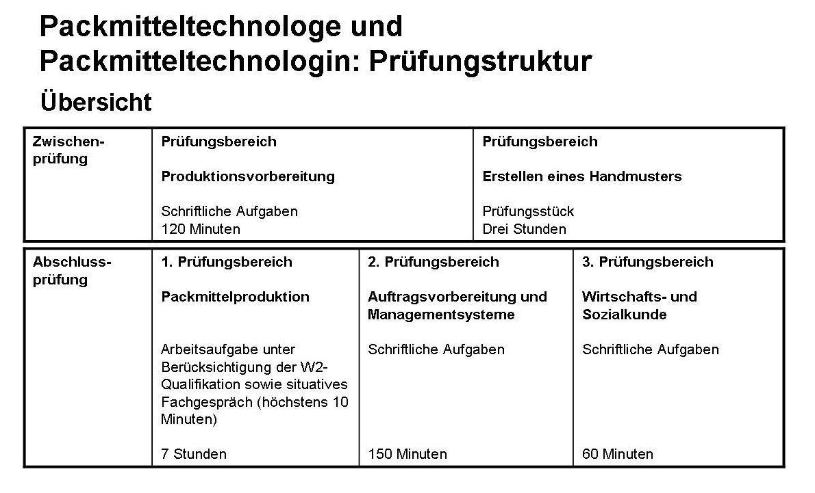 Übersicht über die Prüfungsstruktur im dualen Ausbildungsberuf Packmitteltechnologe